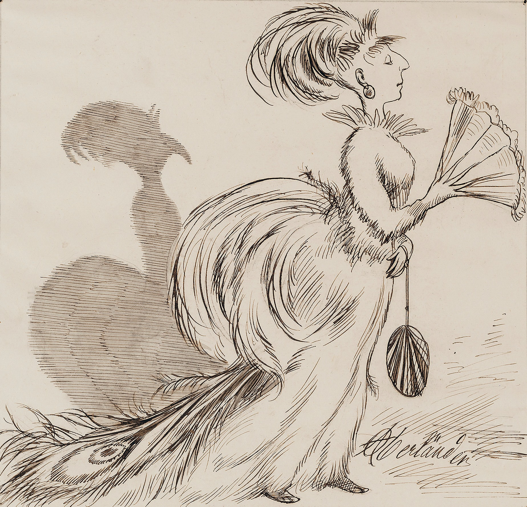 Adolf Oberländer: Frau Pfau Feder in Tusche auf Papier 21 x 20 cm Rechts unten signiert